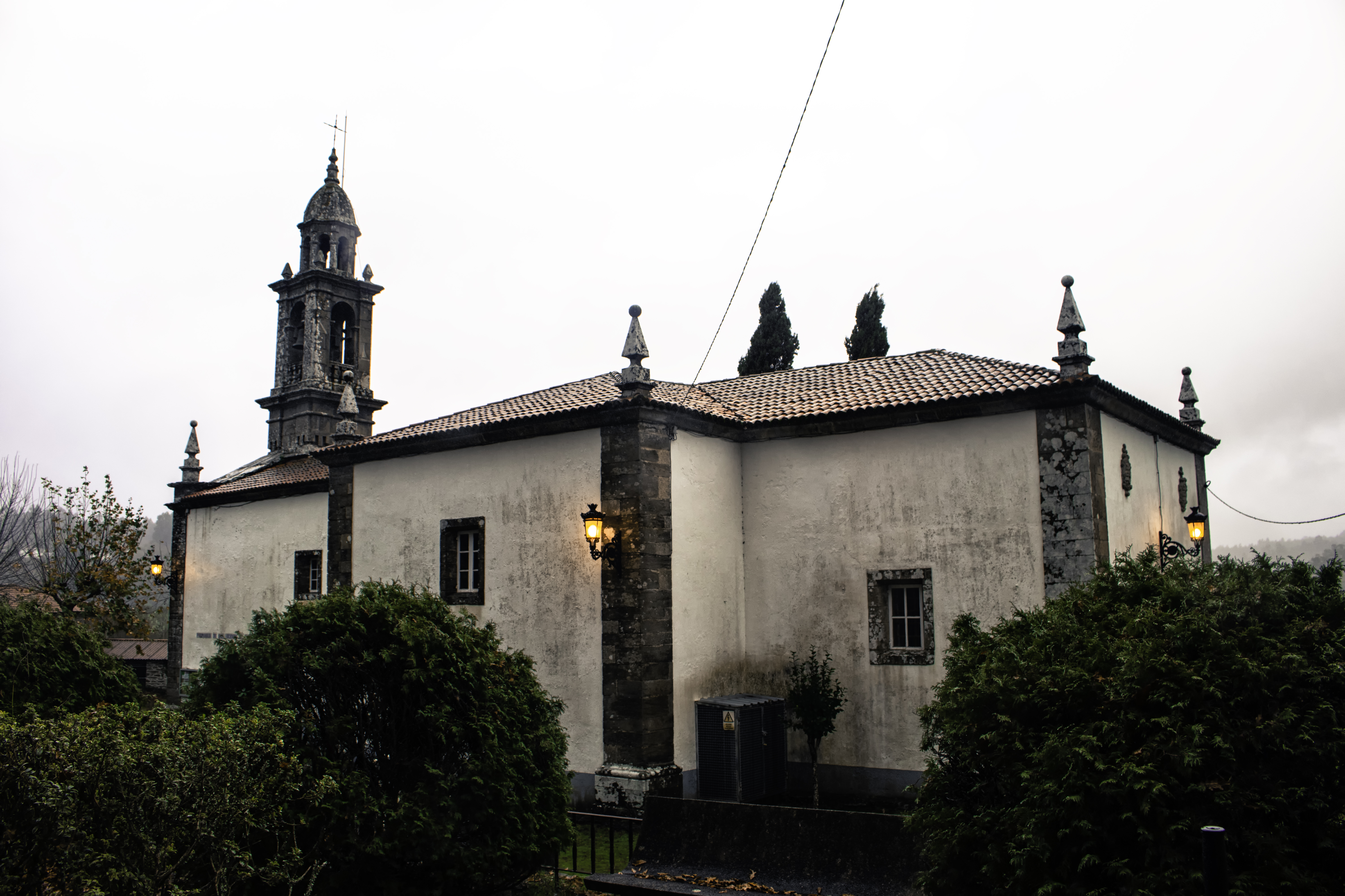 Igrexa de San Vicenzo de Bama, no concello coruñés de Touro.